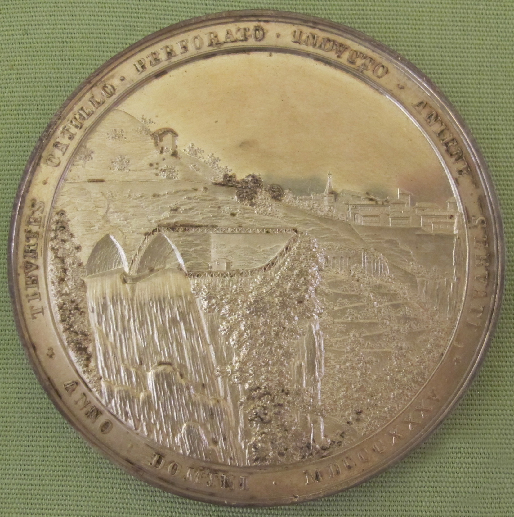 Carl friedrich lorenz, gregorio XVI, v. con villa gregoriana